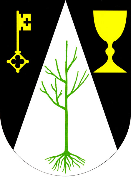 Znak obce Vanovice